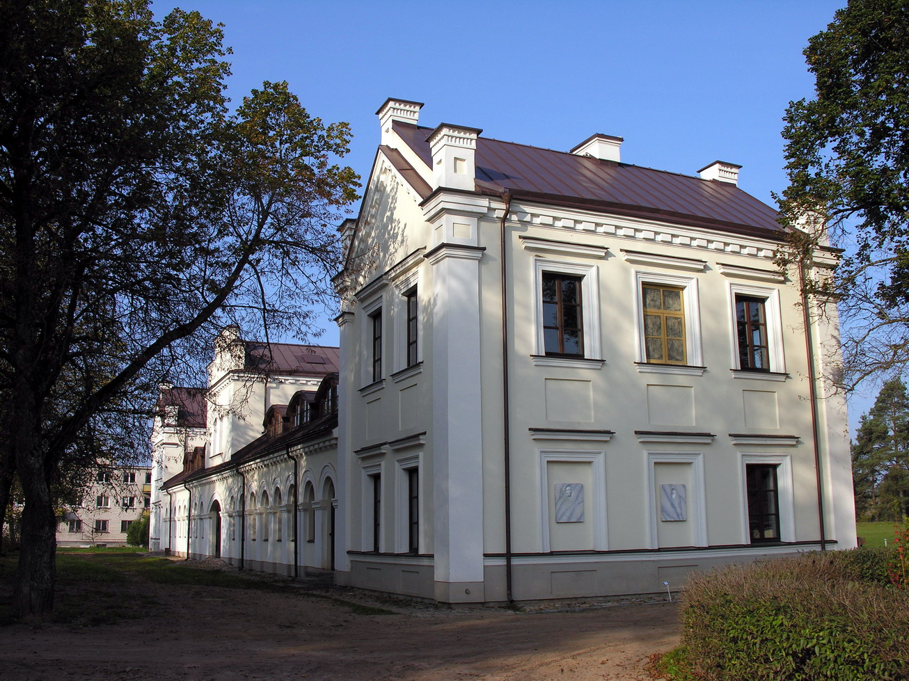 Vilniaus universiteto botanikos sodas. Restauruotos buv. dvaro arklidės XIX a.